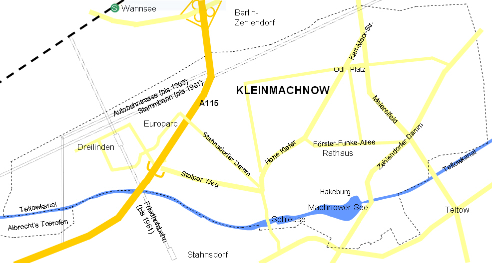 Kleinmachnow Verkehr / traffic